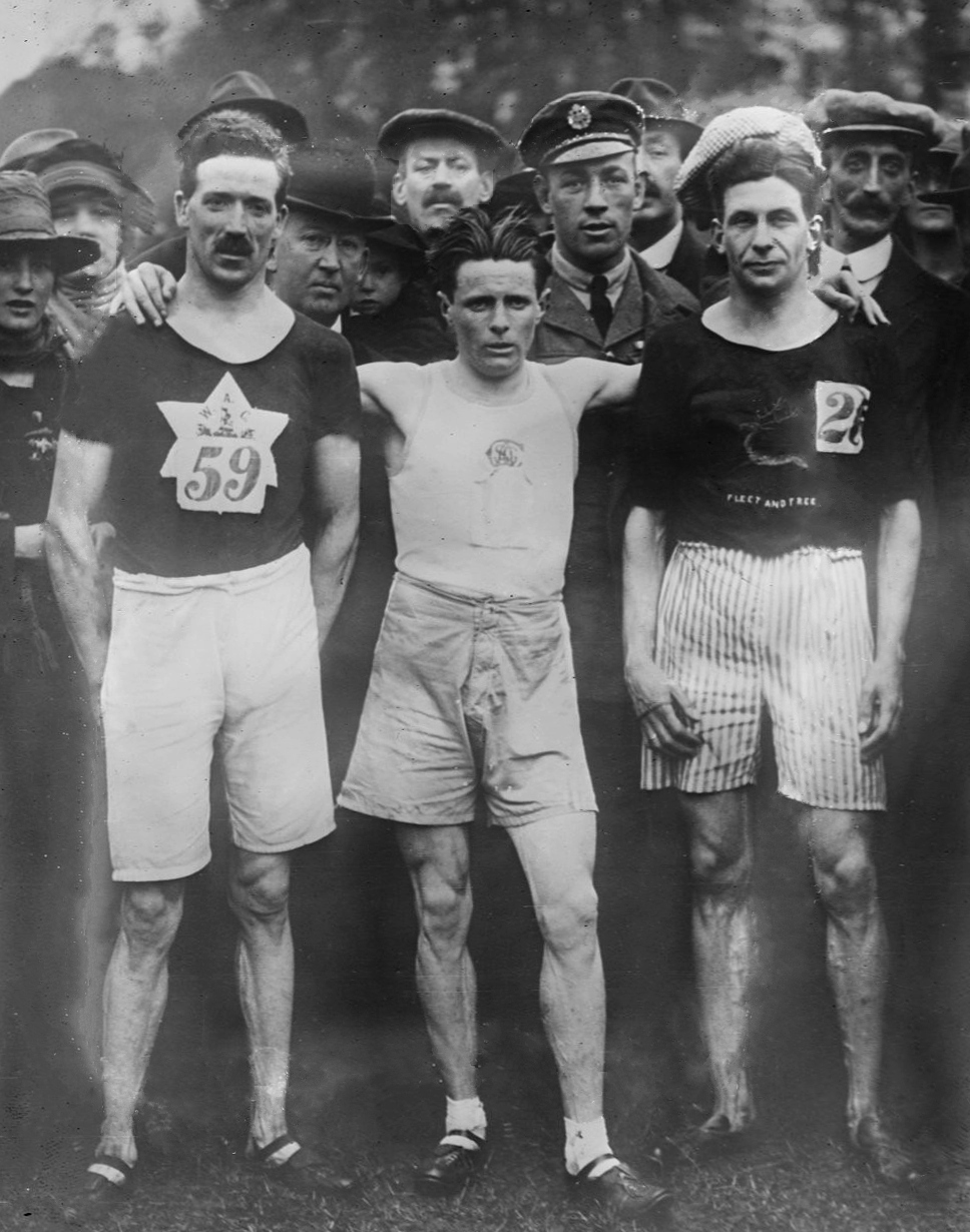 National anglais [épreuve de cross à Windsor], [Charles] Clibbon, [Joseph] Guillemot gagnant, [Christopher] Vose : [photographie de presse] / [Agence Rol]